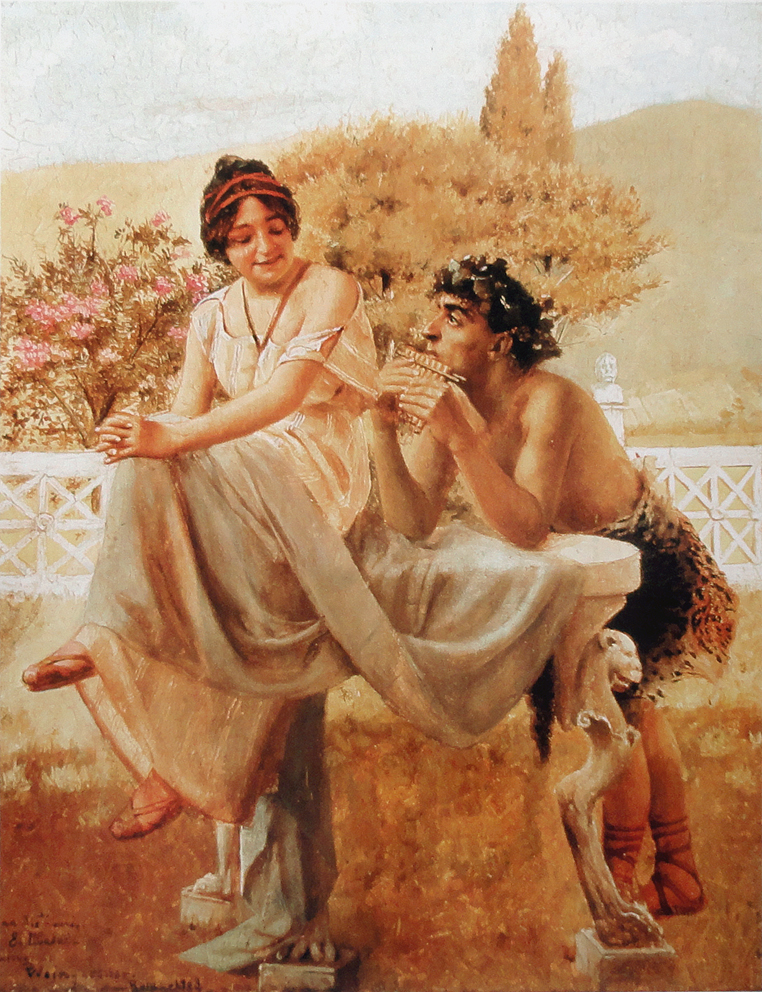 Idílio, óleo sobre madeira, 25 x 19 cm, coleção particular